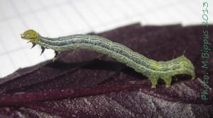 Trichoplusia orichalcea larvae